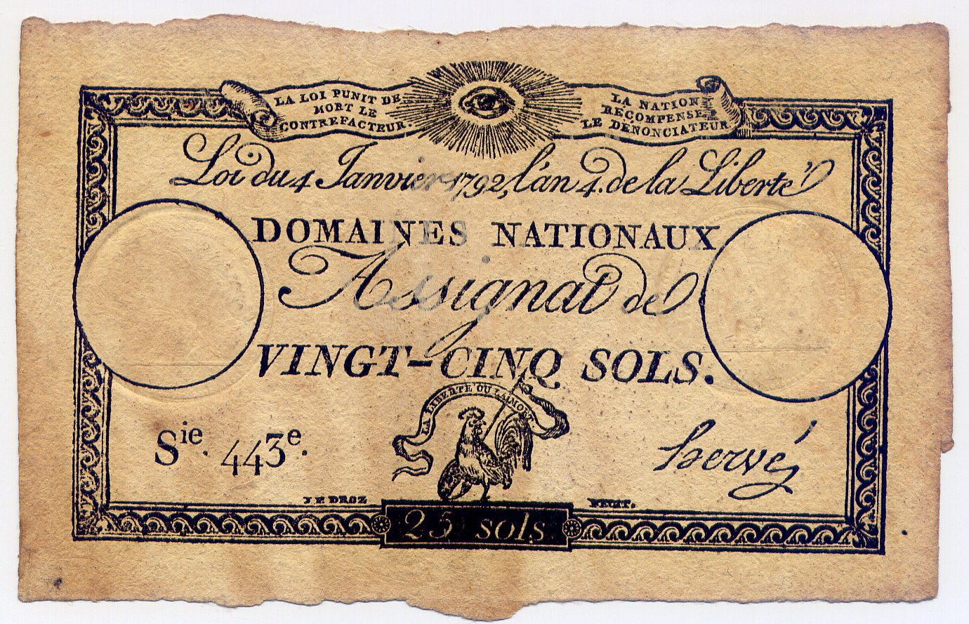 Assignat de 25 sols, série 443, signé Hervé